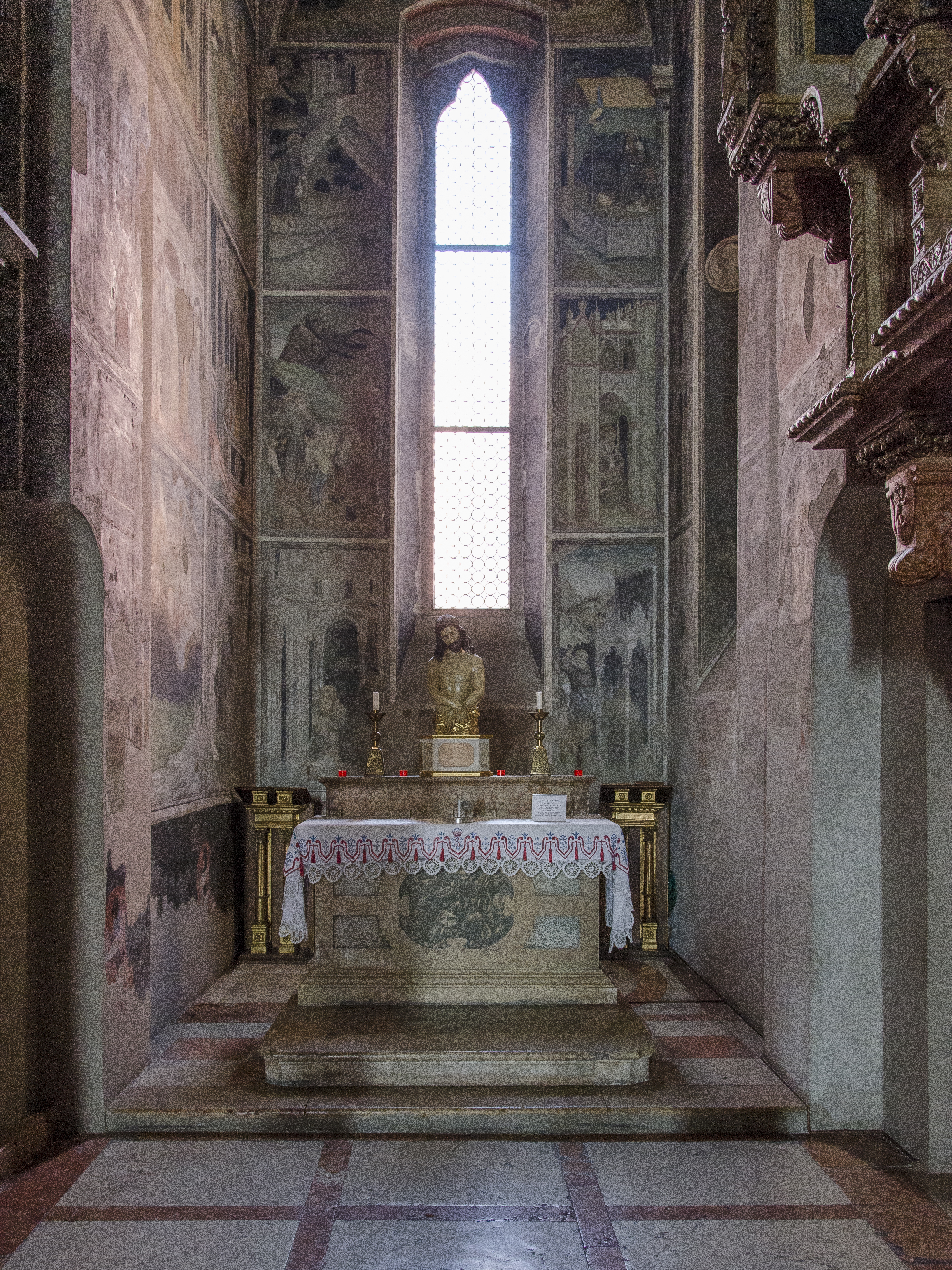 Cappella Guantieri nella chiesa di Santa Maria della Scala, a Verona